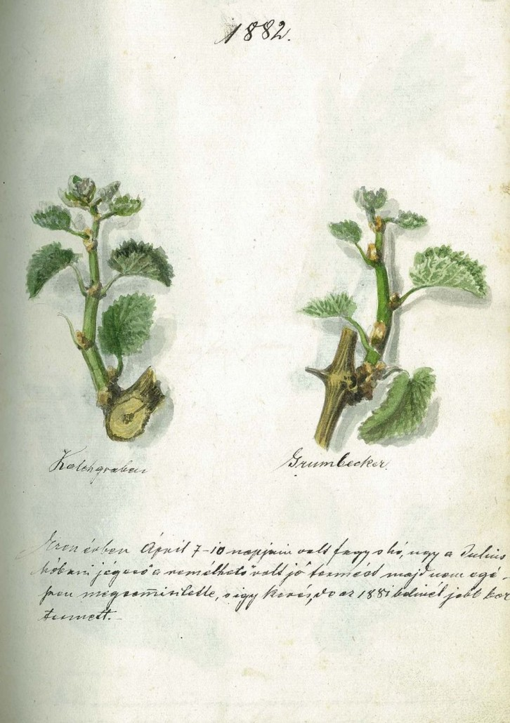 A Szőlő jövésnek könyve egy lapja. Kőszeg egyik régi hagyománya az 1740 óta vezetett könyv, melybe minden évben április 24-én berajzolják a Szent György-napi szőlőhajtást, fontos dokumentum a város bortermelésének történetét illetően.